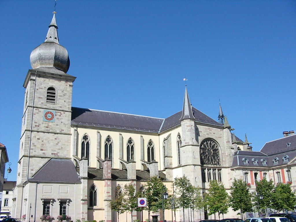 L'église Saint-Pierre de Remiremont (Vosges)